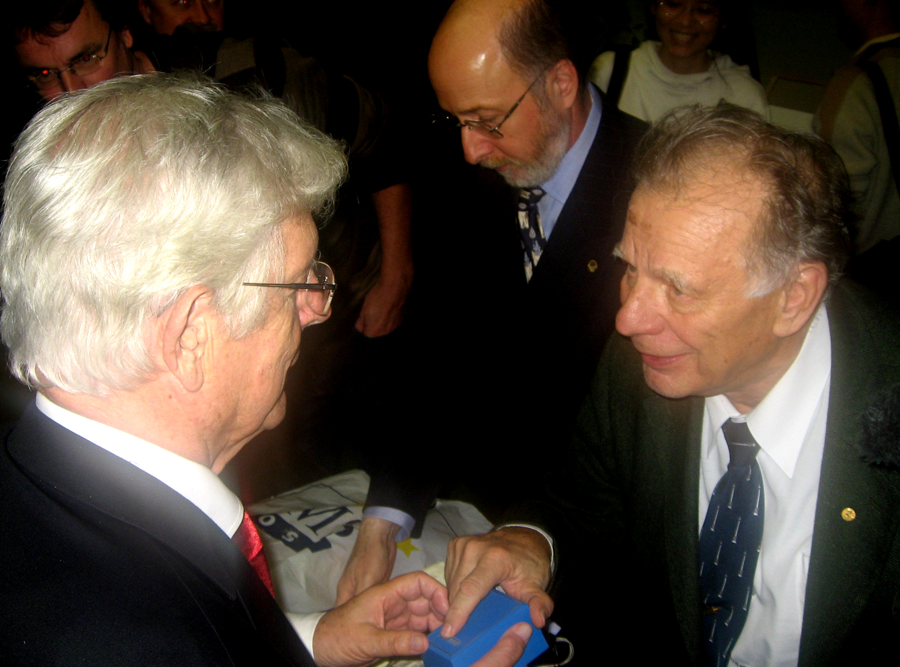 Prof. Klaus Thiessen zusammen mit Nobelpreisträger Zhores Alferov aus St. Petersburg